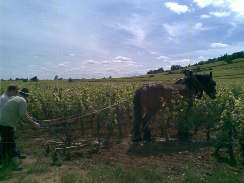 Labour à traction équine.